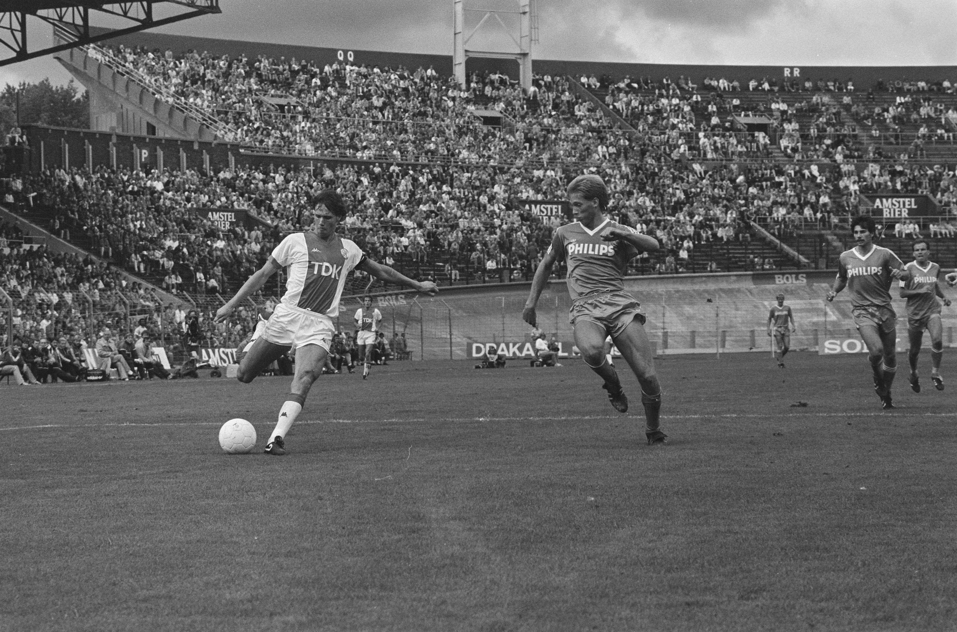 Collectie / Archief : Fotocollectie Anefo Reportage / Serie : [ onbekend ] Beschrijving : Ajax PSV : 3-0: Marco van Basten gaat scoren; rechts: Adick Koot (PSV) Datum : 31 augustus 1986 Trefwoorden : sport, voetbal Persoonsnaam : Adick Koot, Basten, Marco van Fotograaf : Molendijk, Bart / Anefo Auteursrechthebbende : Nationaal Archief Materiaalsoort : Negatief (zwart/wit) Nummer archiefinventaris : bekijk toegang 2.24.01.05 Bestanddeelnummer : 933-7445